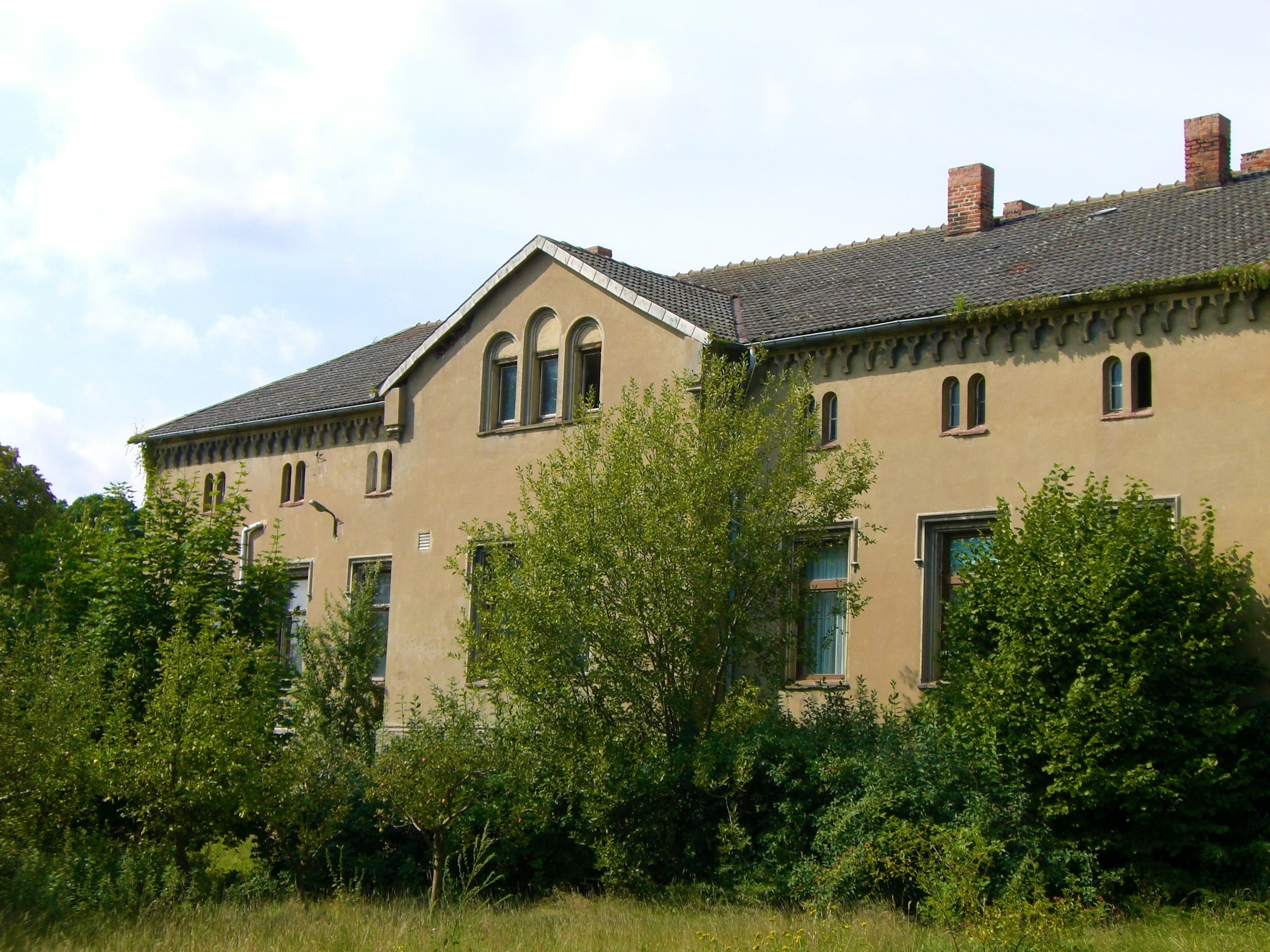 Gut Hasselburg, Gemeinde Flechtingen-Hasselburg (Foto: Kora Duberow)